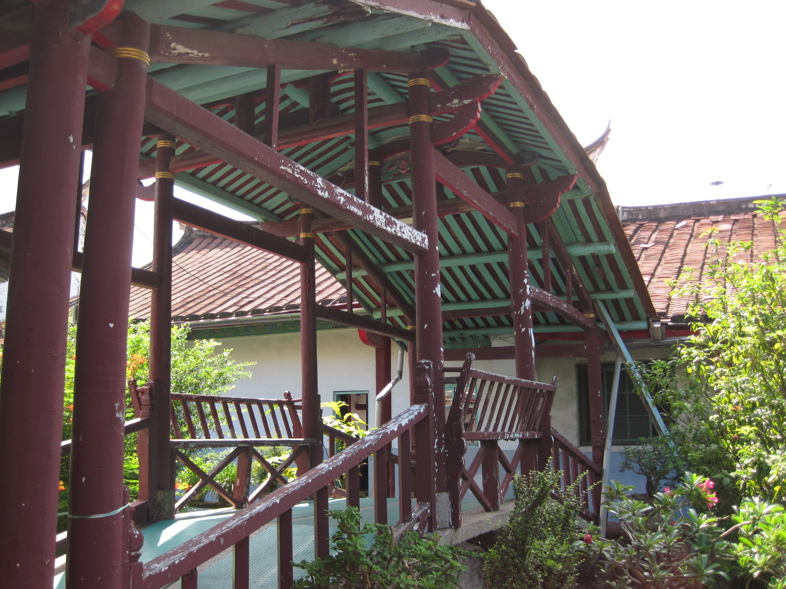 臺南法華寺延壽橋